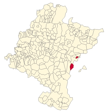 Javier Navarra